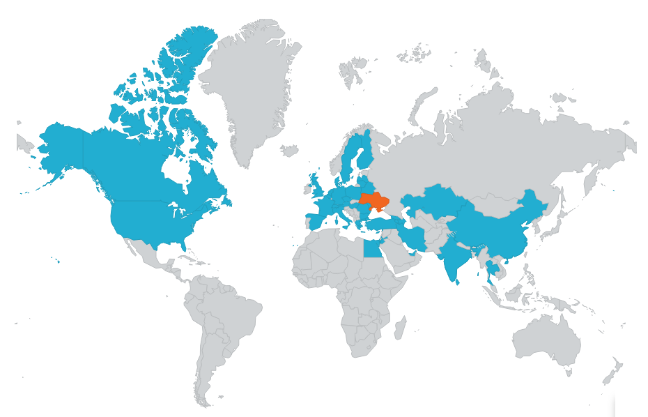 Destination countries of the Ukraine International Airlines as of September 2018